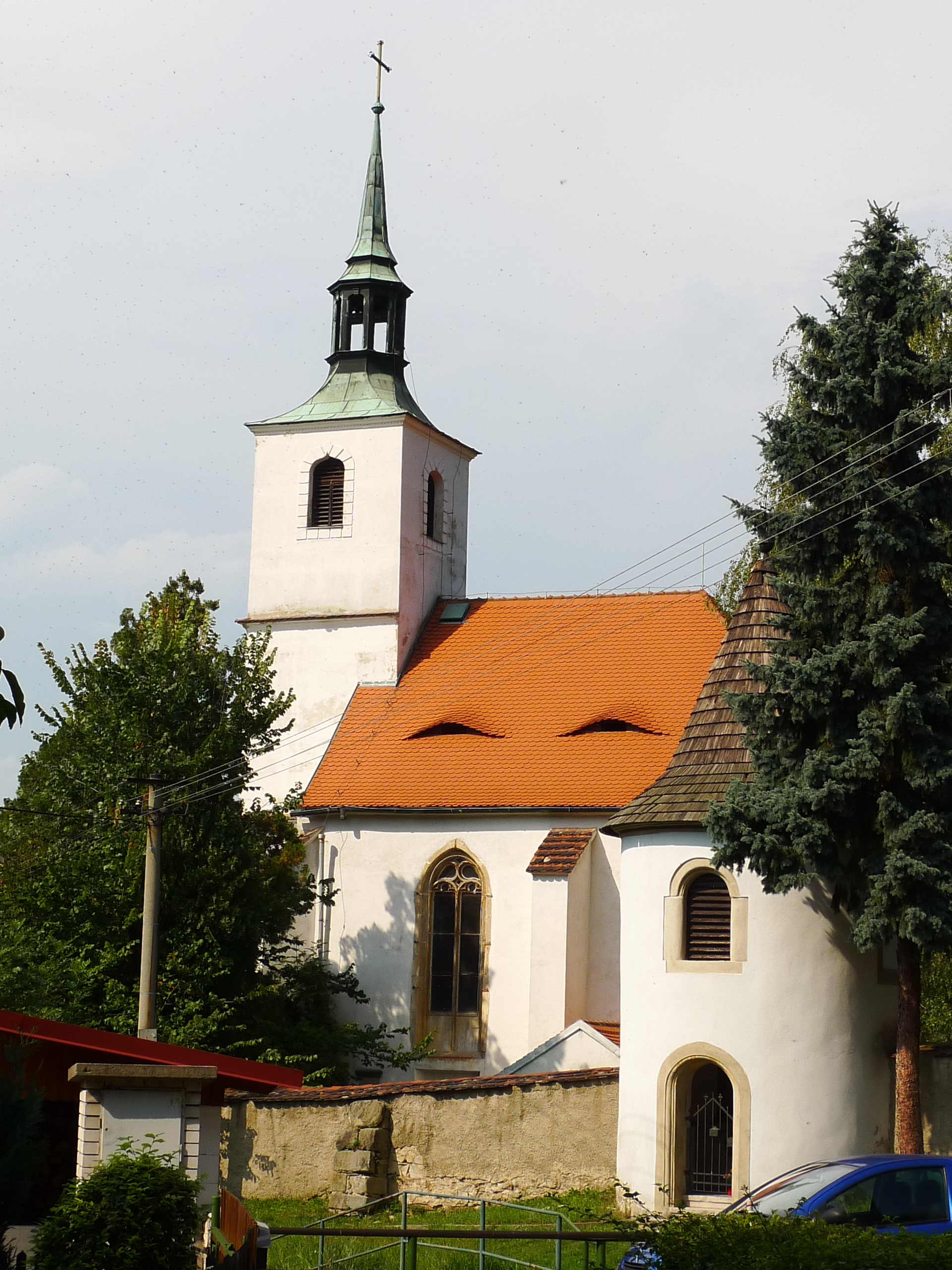 Kostel svatého Jakuba Staršího, Svatojakubská, parc. 792, 793, Svádov.